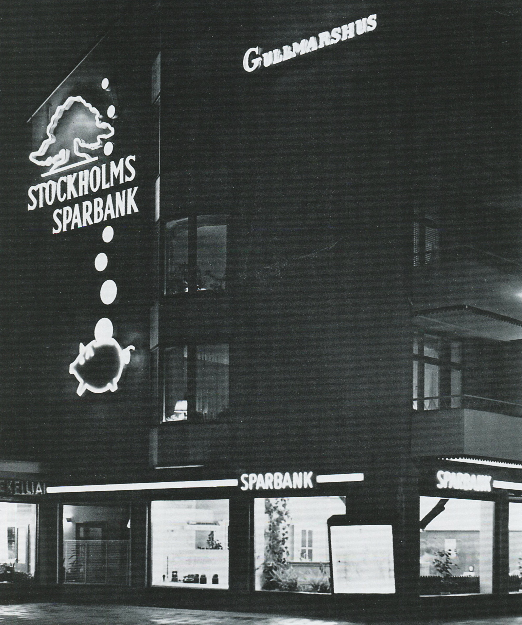 Stockholms Sparbanks kända ljusreklam på Gullmarshuset vid Gullmarsplan i Stockholm